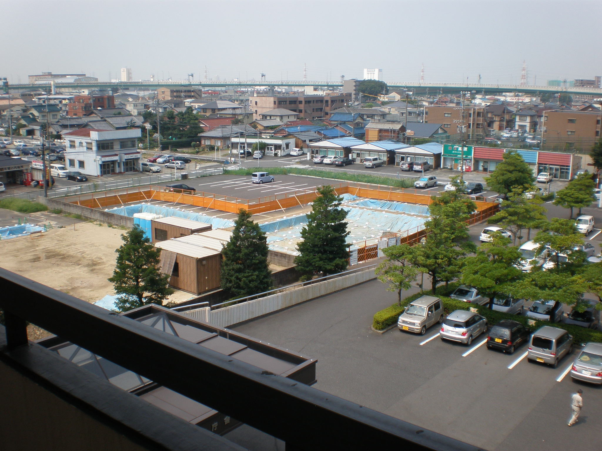 愛知県小牧市の小牧市役所内にある発掘中の小牧池田遺跡（撮影場所：小牧市役所南庁舎4階から撮影）